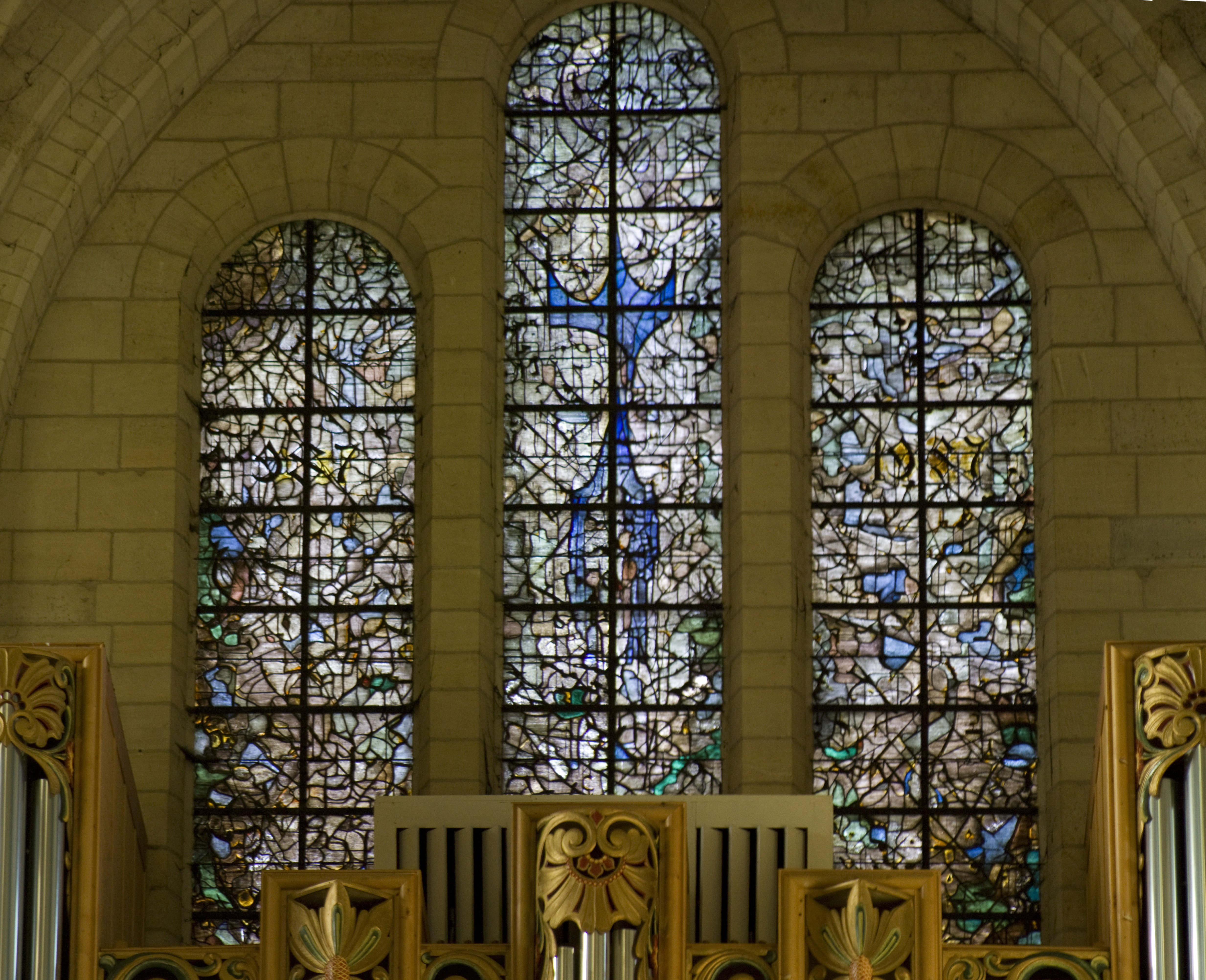 Vitrail du Millénaire : La monarchie capétienne a pris racine avec l' avènement de Hugues Capet. Elee est évoquée par un arbre se développant à travers les trois vitraux. Le vitrail central, aux dominates dorées, nous montre s'élançant d'origines obscures une forme diaphane, bleu de France, surmontée d'une couronne. Seuls le monogramme de Hugues Capet et les dates 967-1967 ramènent de manière explicite au thème commémoratif du millénaire. Le bleu, chemin de l'infinioù le réel se transforme en imaginaire est la couleur de l'oiseau inaccessible et si proche symbole de la relation entre le ciel et la terre. Il est également la couleur de la Vierge, patronne de la cathédrale de Noyon Saint Médard et Saint éloi sont rapellés par leur mitre. Claude Courageux, Maître-Verrier Les vitraux ont été mis en place du 8 au 14 Juin 1967